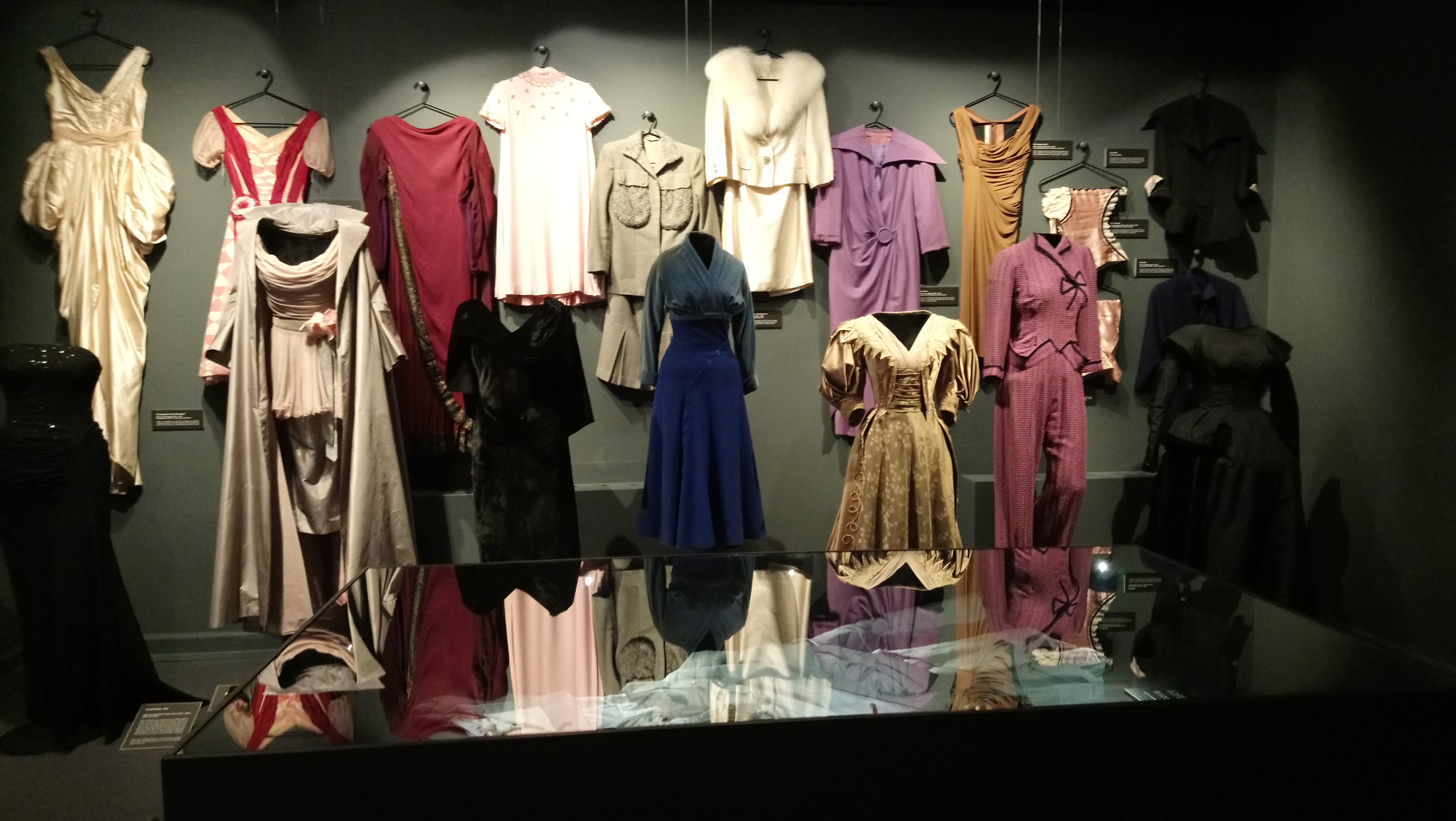 Specialudstilling i 2018 om den danske kjoledesigner Holger Blom (1905-1965) på Museum Skanderborg.